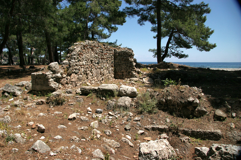 Phaselis